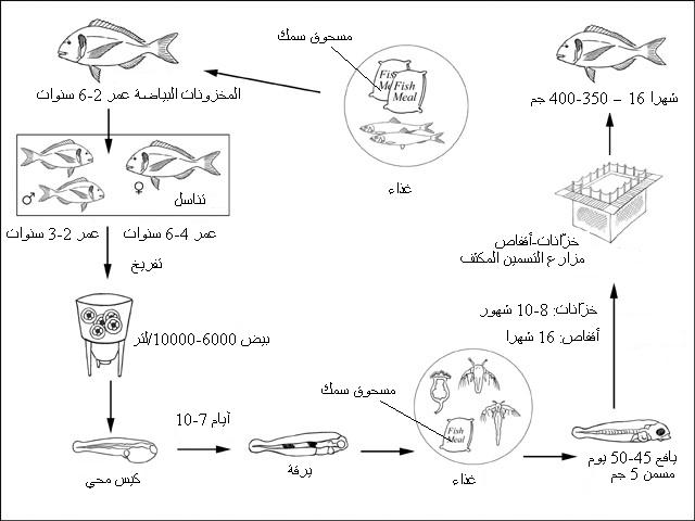 دورة انتاج أسماك الدنيس 2